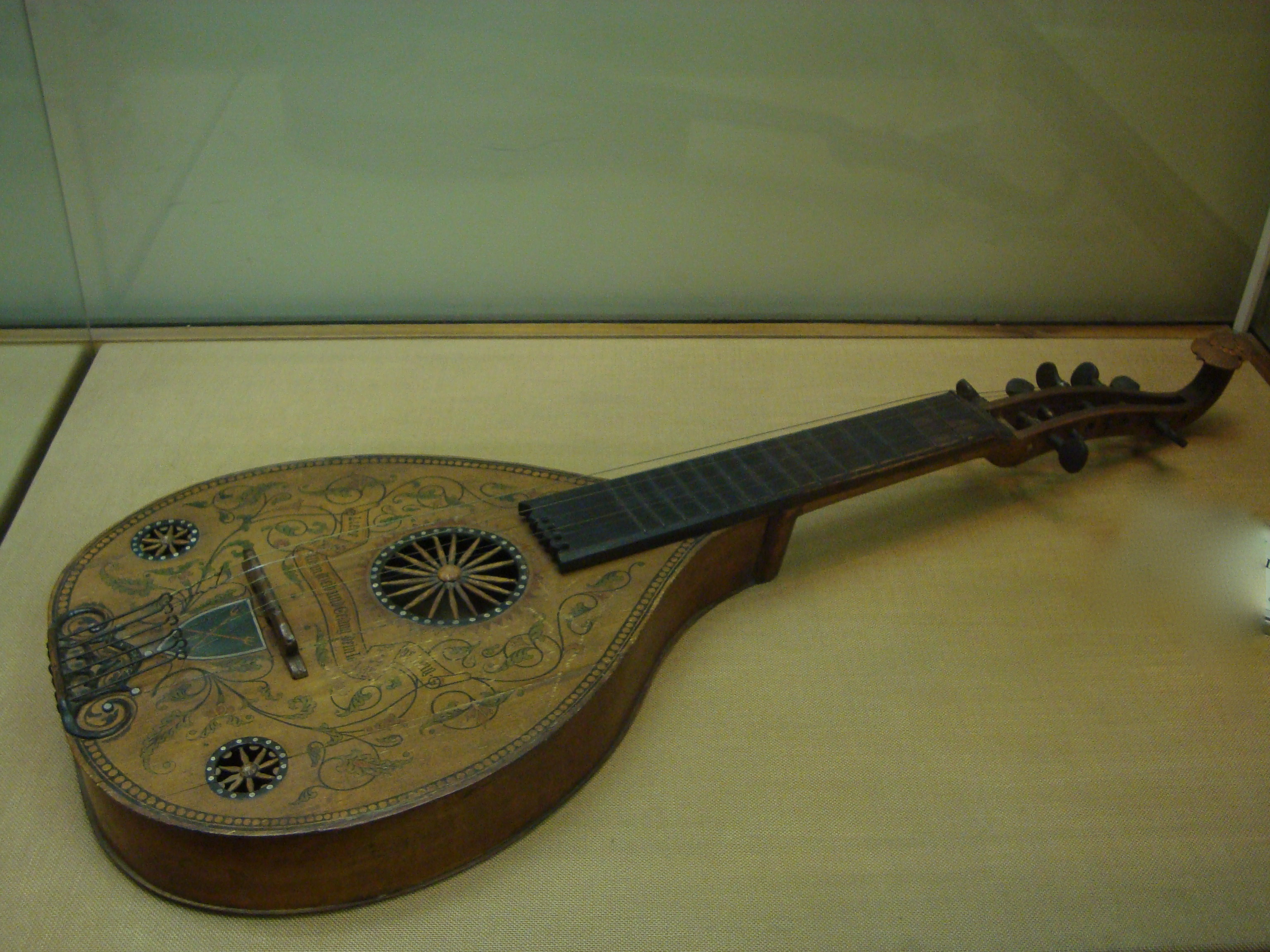 Cistrum ou Citola, datant du XVIIIe siècle, faite par P. Zungg, Museo Nazionale degli Strumenti Musicali di Roma